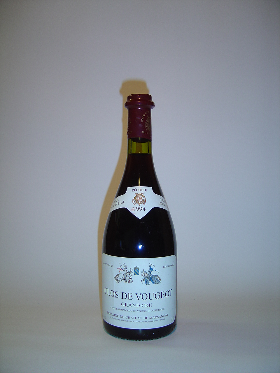 1994er Clos de Vougeot Grand Cru selbst fotografiert am 15.01.2006